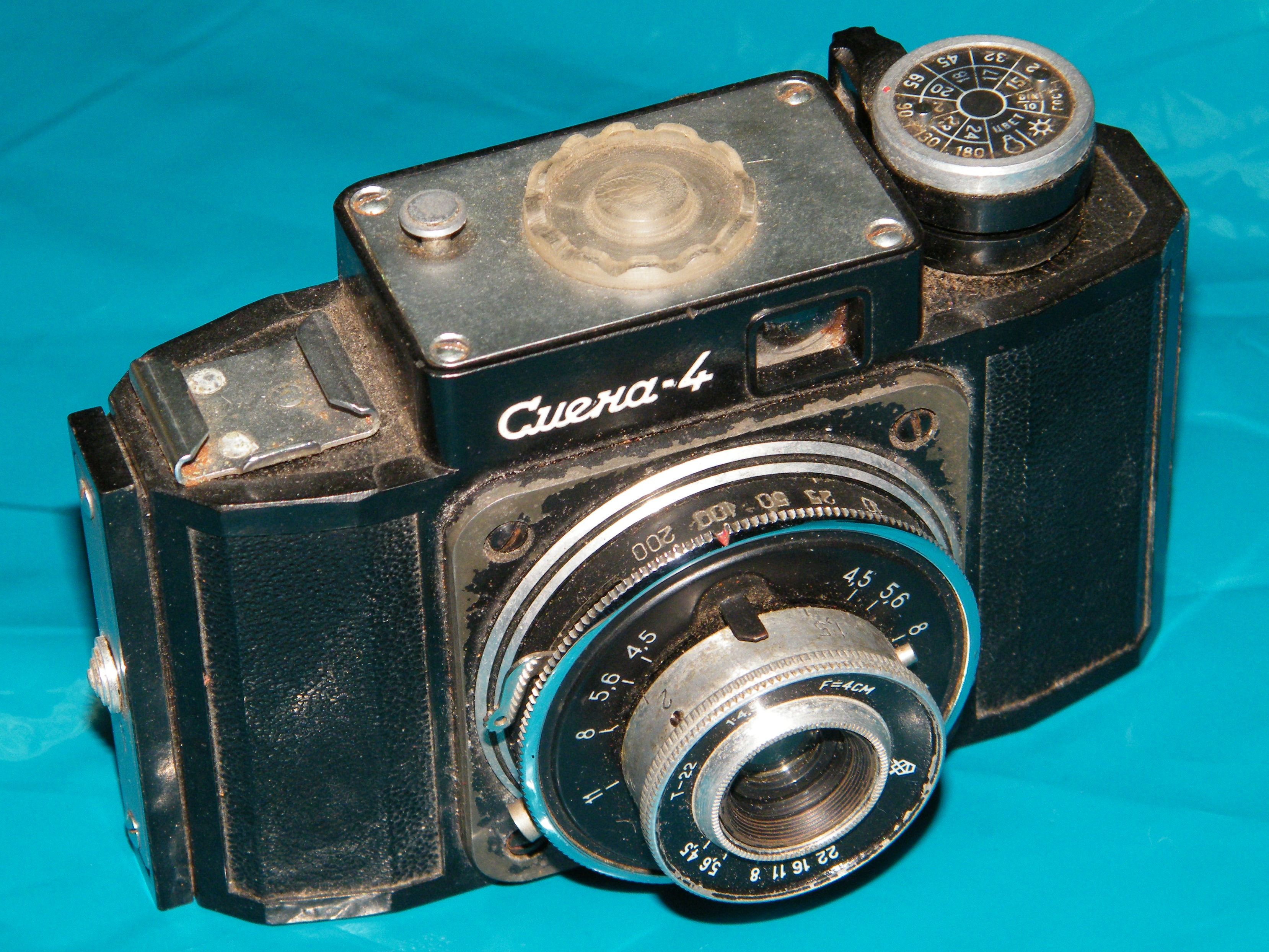 Фотоаппарат "Смена-4", Ленинград. СССР.